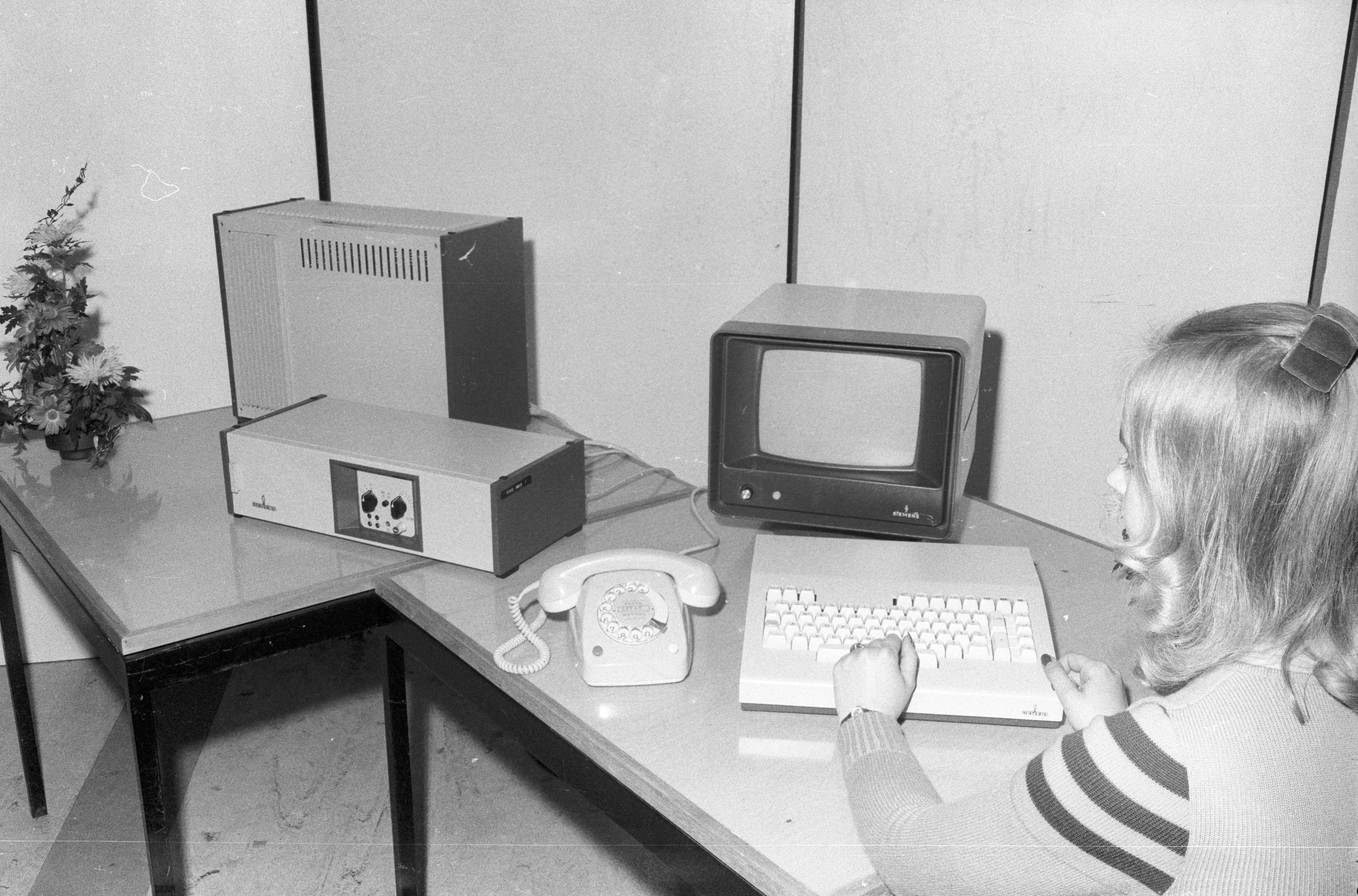 Vorführung des elektronischen Lexikons, das zur Segelolympiade 1972 in Kiel an zwei Stellen eingesetzt werden soll. Die Informationen ruft es in der Münchner Siemens-Zentrale ab.